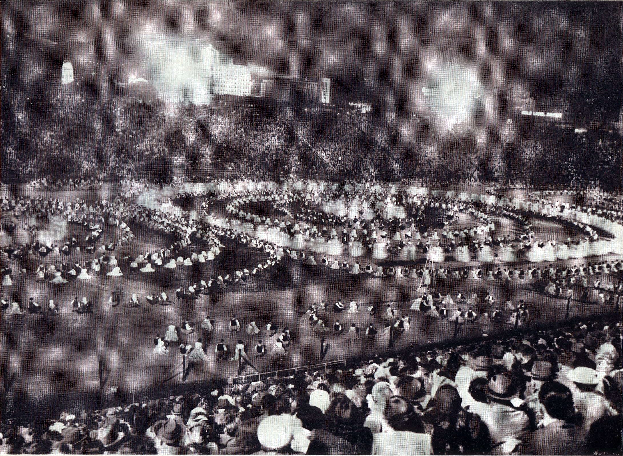 Massavertoning deur 3000 volkspelers tydens die Van Riebeeckfees, Kaapstad